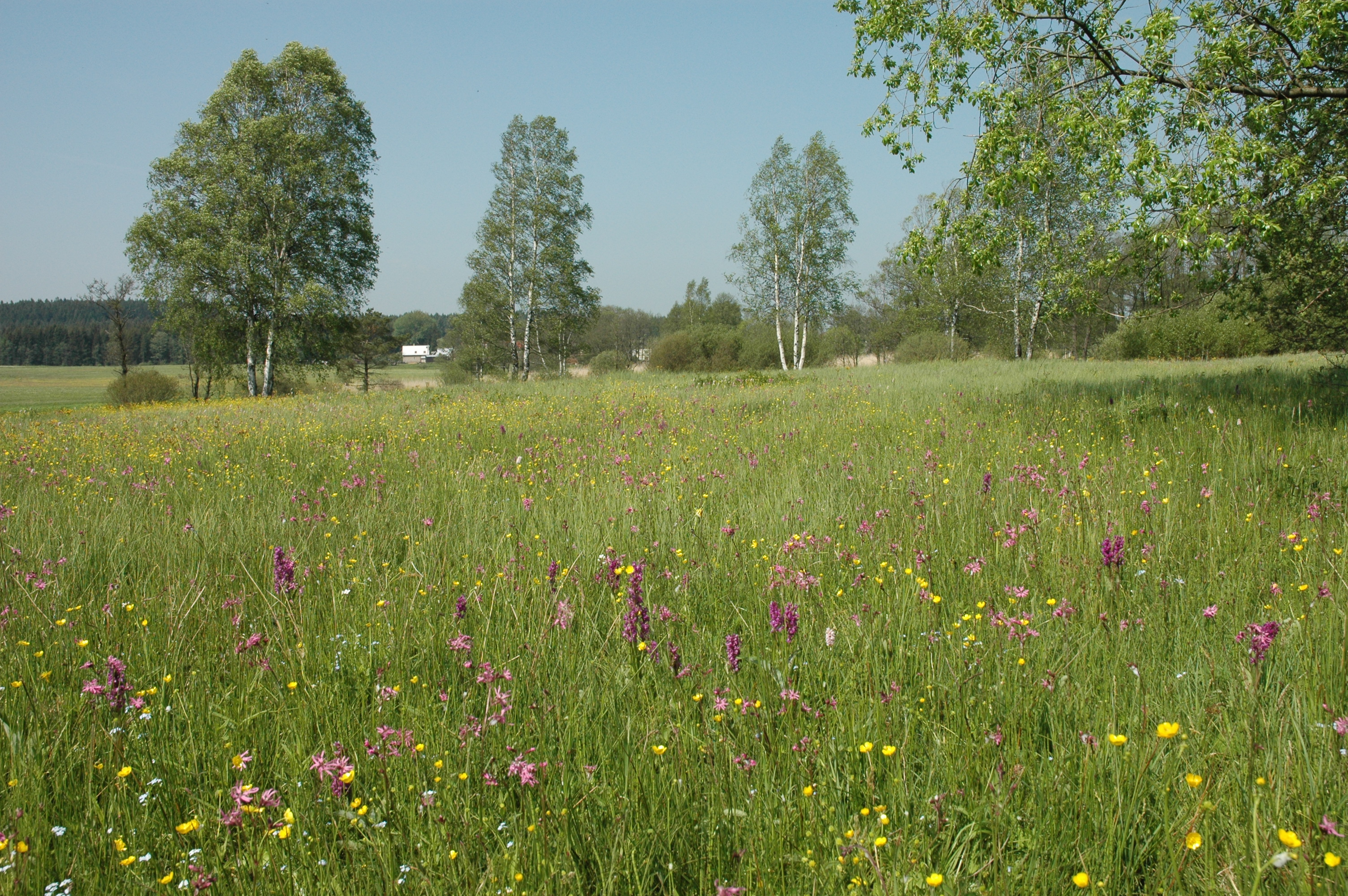 Natural Reserve Louky v Jeníkově, near Hlinsko Town